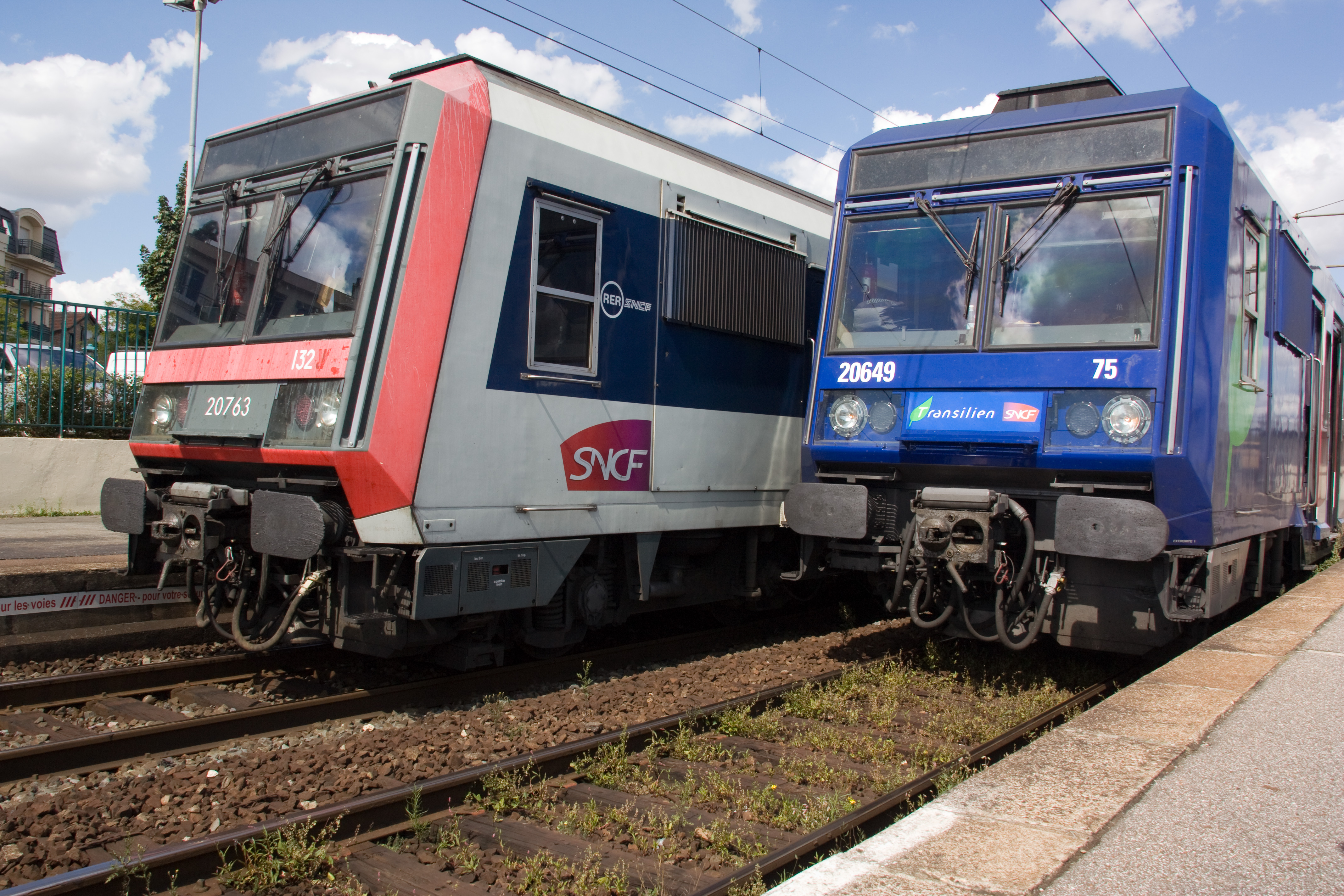 La Gare de Villiers-le-Bel - Gonesse - Arnouville, département du Val-d'Oise, France